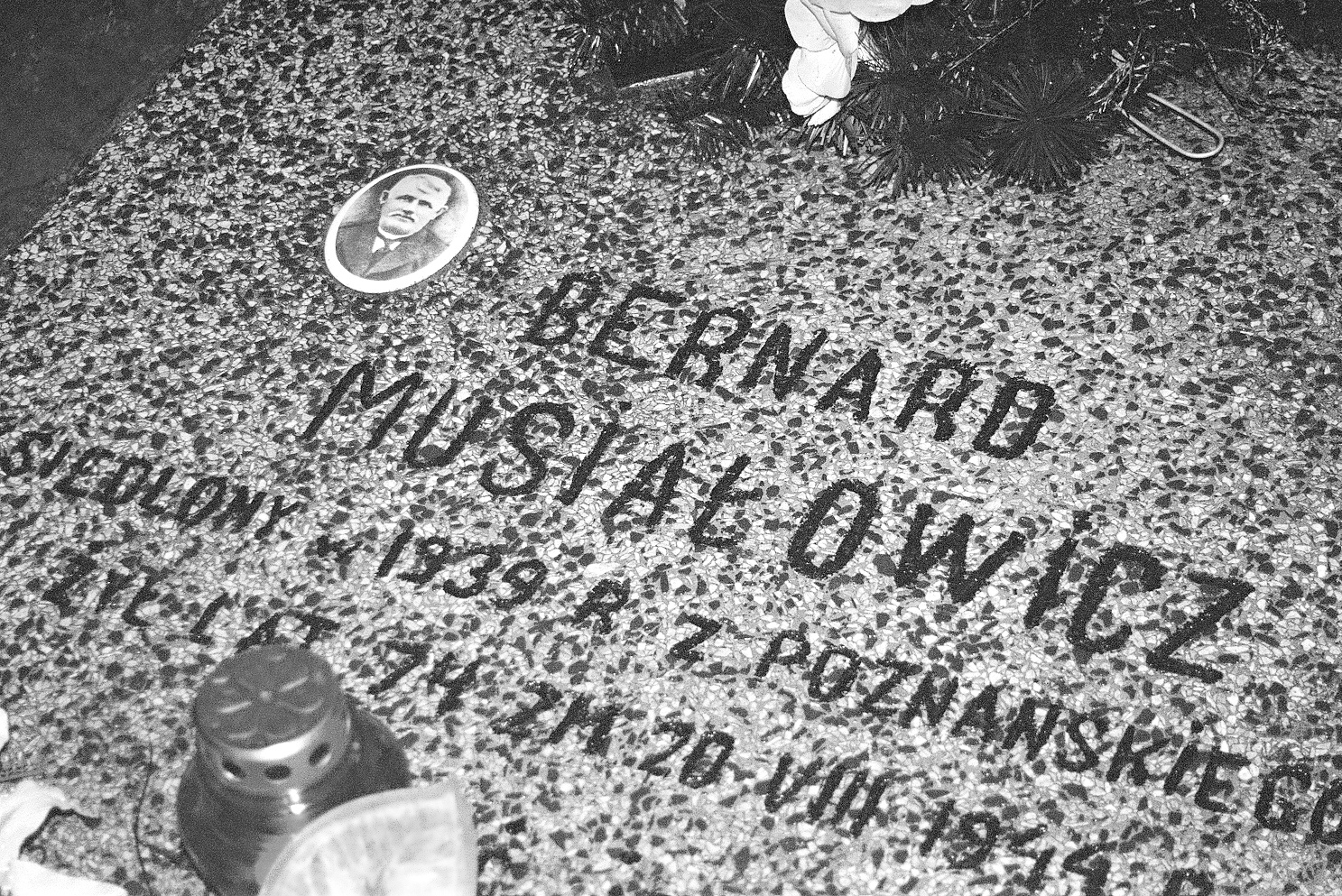 Grębków (pow. węgrowski) - cmentarz parafialny. Grób wysiedlonego jesienią 1939 r., w ramach niemieckiej akcji wysiedlenia Polaków z Kraju Warty, gospodarza Bernarda Musiałowicza (1872-1944). Nie doczekał powrotu do swojego majątku w Brzekińcu (gm. Budzyń) w Wielkopolsce. Po oswobodzeniu w ramach akcji "Burza", zmarł w folwarku Jabłonno 20 sierpnia 1944 r.